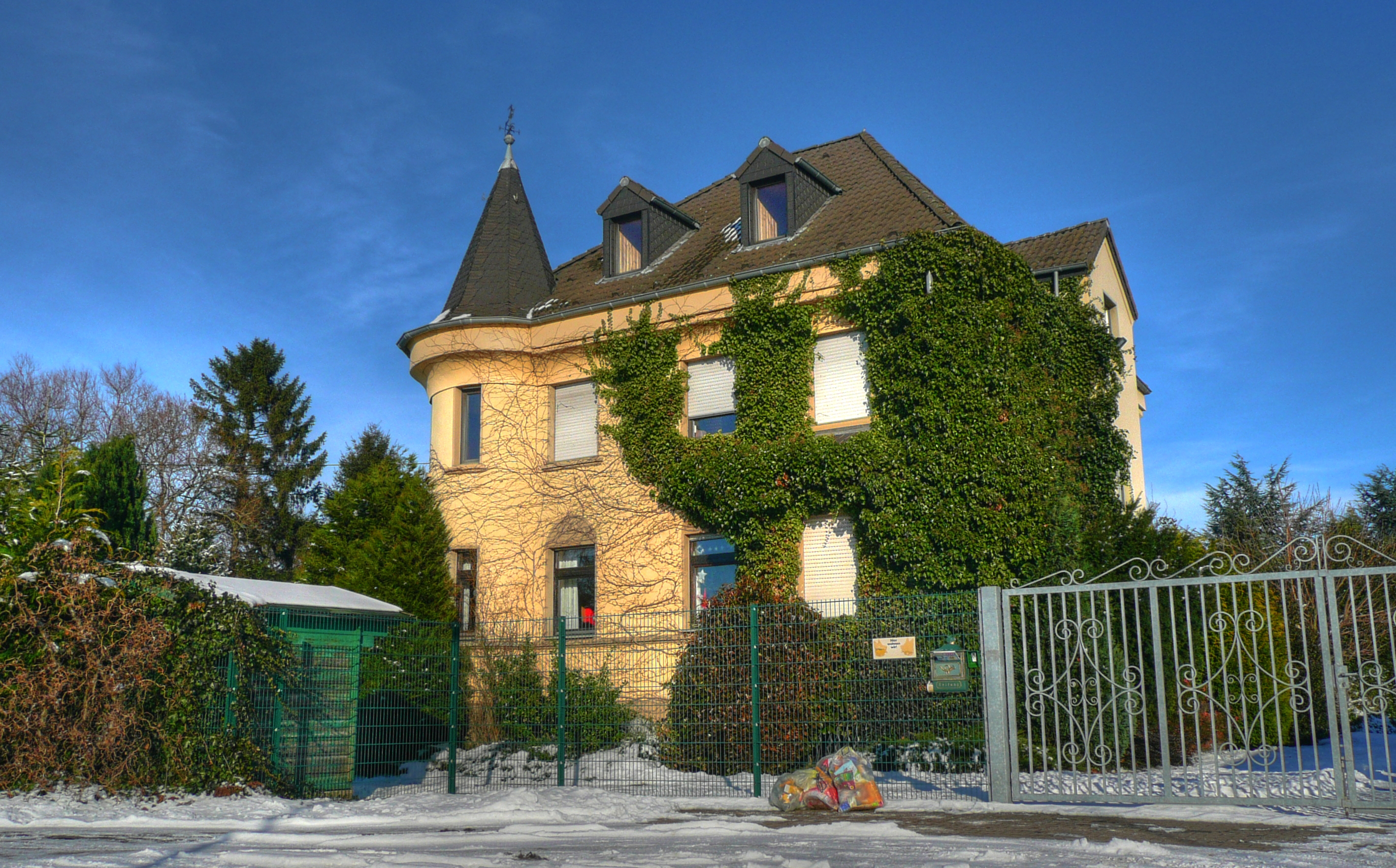 Gebäude gegenüber Haus Verken (zu Pier gehörig)